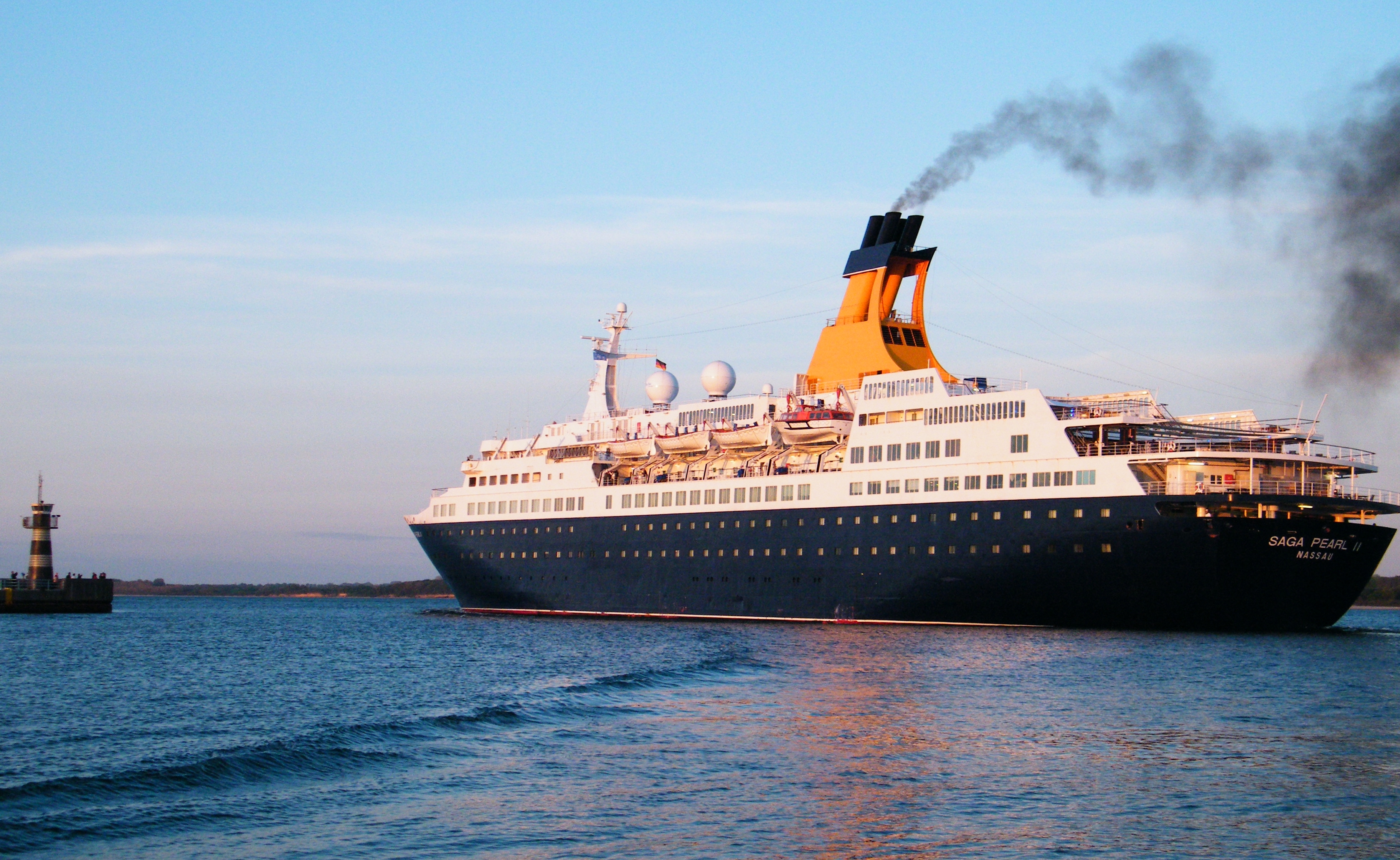 SAGA PEARL II vor Nordermole verlässt Travemünde 16.05.2010